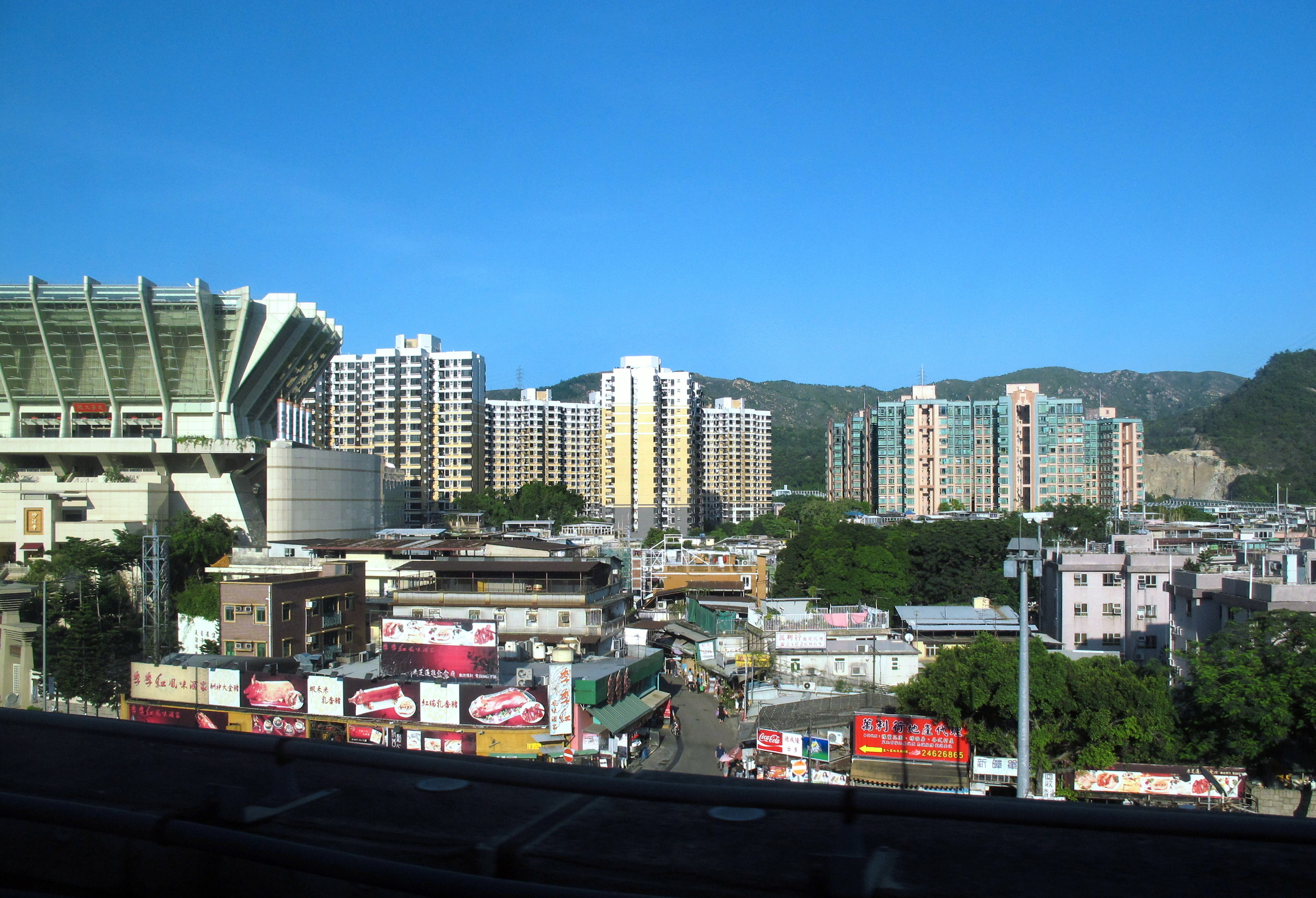 Lam Tei 藍地